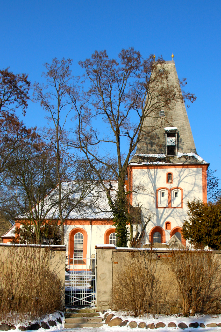 Wiederitzsch - dzielnic Leipzig, Niemcy.